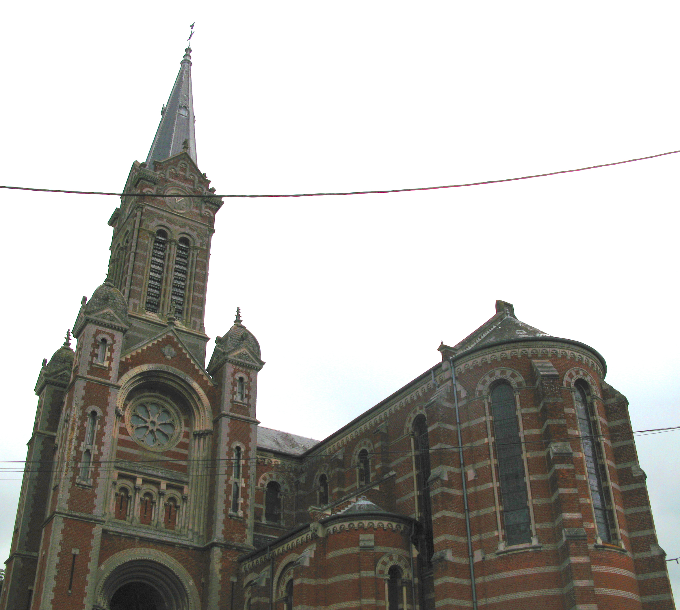 Ailly-sur-Noye (Somme, France) - Eglise vue depuis l'angle fait par : la rue vers Montdidier ("Rue de Louvrechy", en fait le début de la route départementale D26), et la "Rue de la Gare" que prolonge la "Rue de Chirmont" (en fait le début de la route départementale D188).